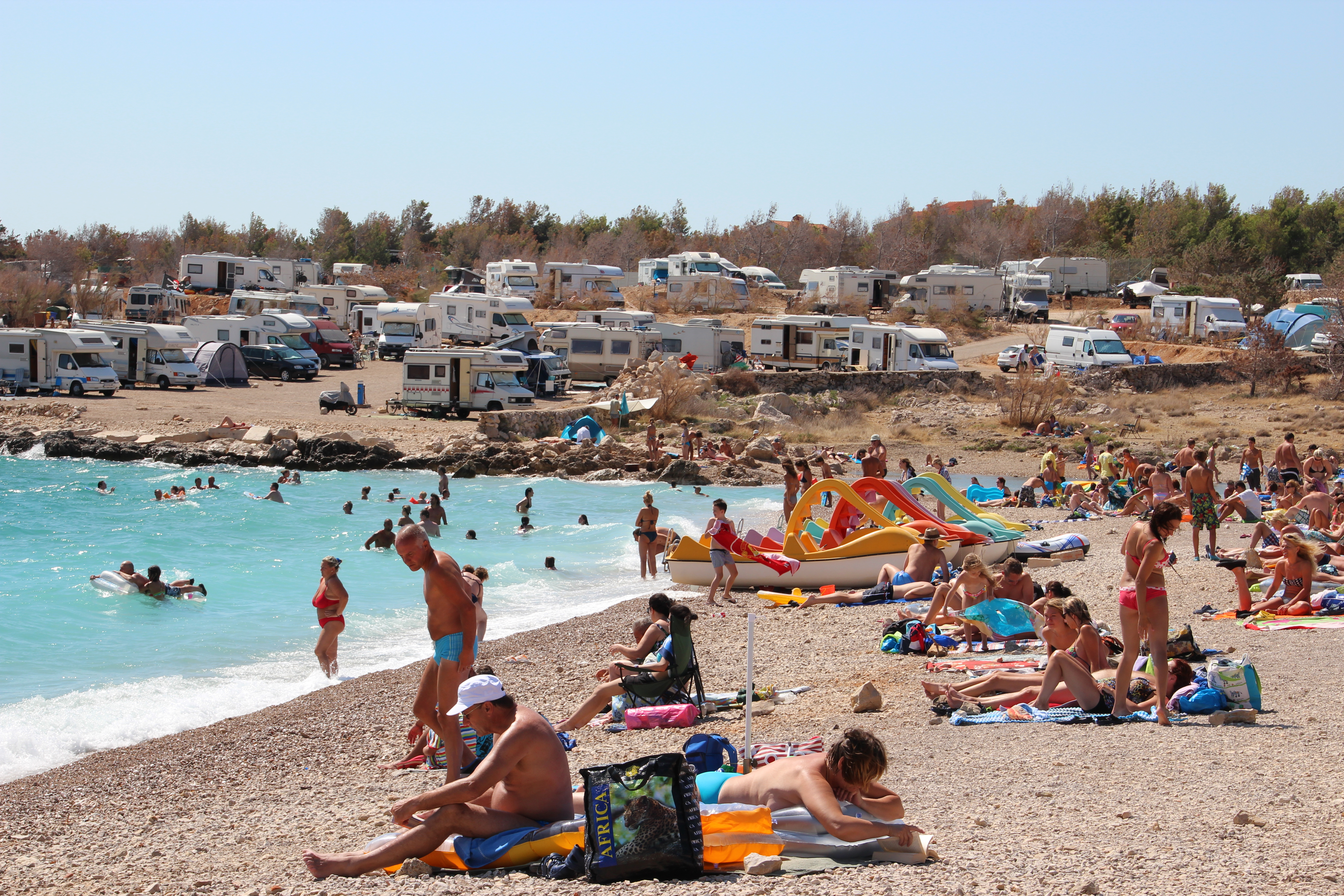 Silo, der Strand und ein nahe liegender Campingplatz